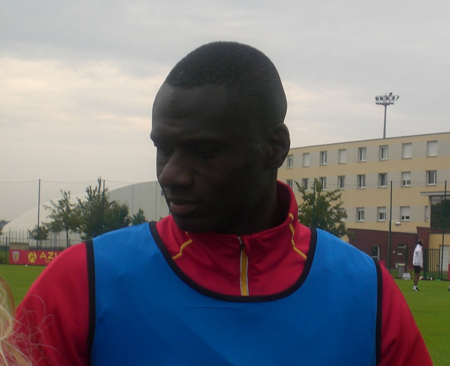 Guirane N'Daw lors d'un entraînement public du Racing Club de Lens, le 19 août 2015, au Centre technique et Sportif de La Gaillette.